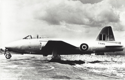 Gloster E.1/44 GA.2 Ace was een verbeterd prototype van de GA1. Er werden drie exemplaren gebouwd waarvan de eerste TX145 was. Dit toestel vloog het eerst op 9 maart 1948.